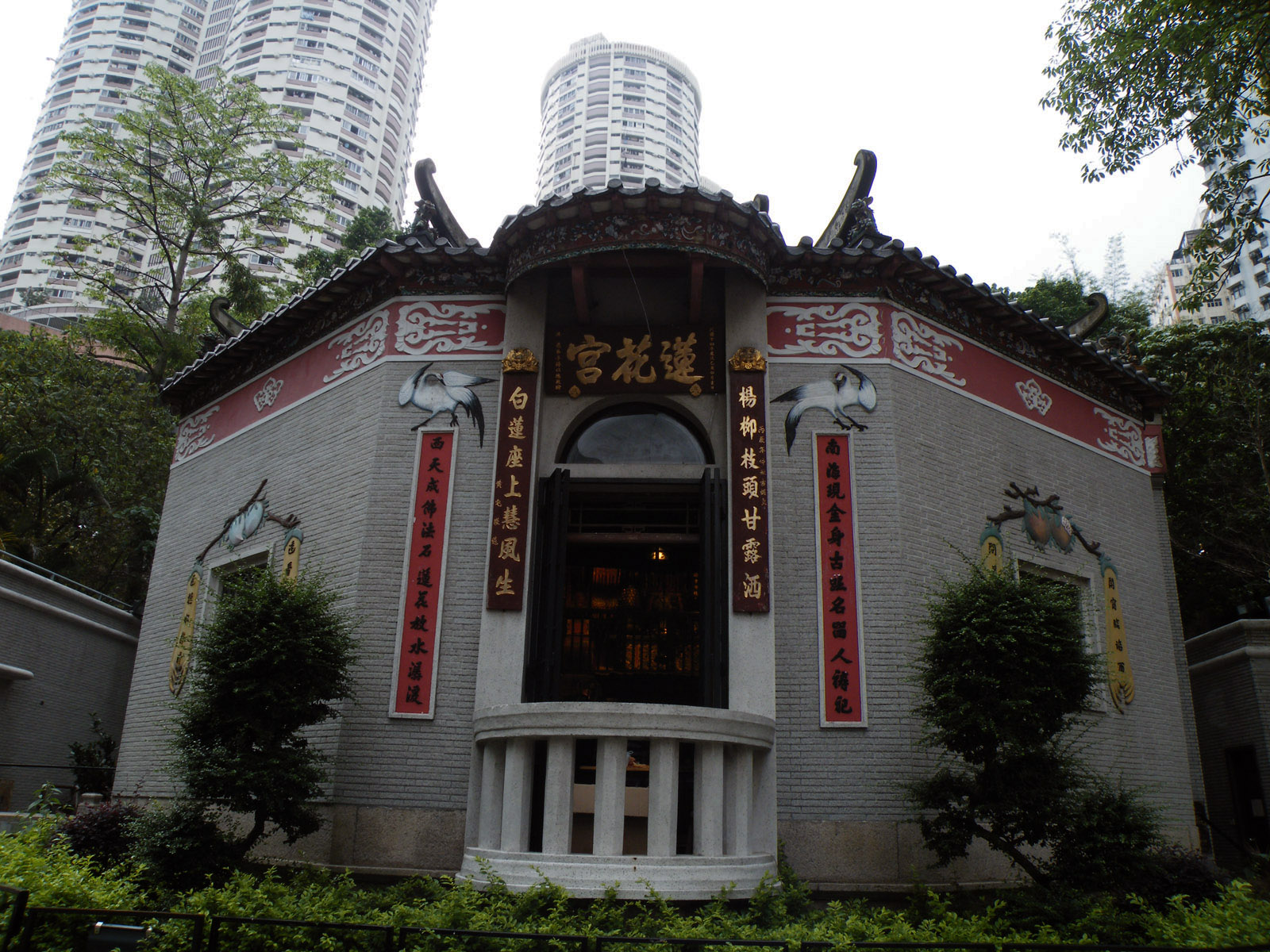 Lin Fa Temple, Tai Hang